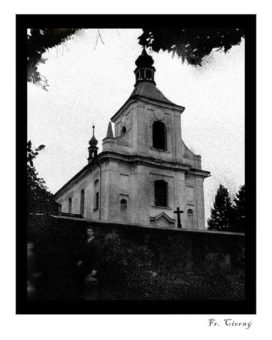 Fotografie kostela Nanebevzetí panny Marie v Panoším Újezdě